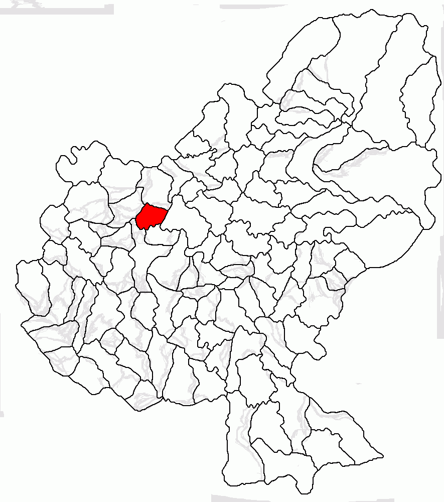 Categorie:Hărţi ale judeţului Mureş